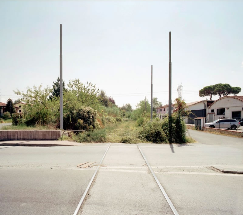 Ex passaggio a livello posto sulla linea S. Stefano di Magra-Sarzana.